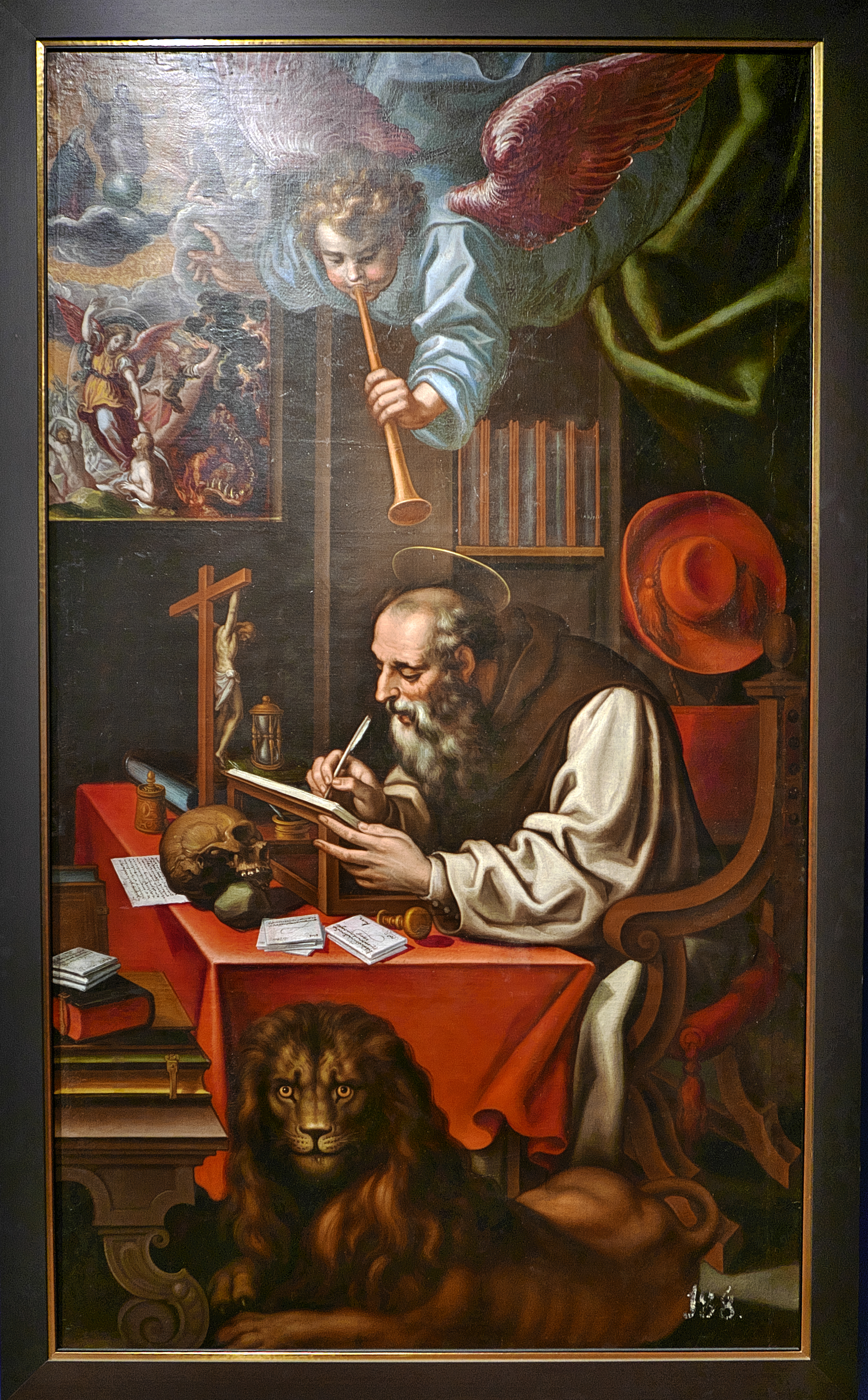 Museo de Guadalajara. Rómulo Cincinato (h. 1591-1597) pinta a San Jerónimo escribiendo la Vulgata y un ángel anuncia las Postrimerías. Procedente del Monasterio de San Bartolomé de Lupiana